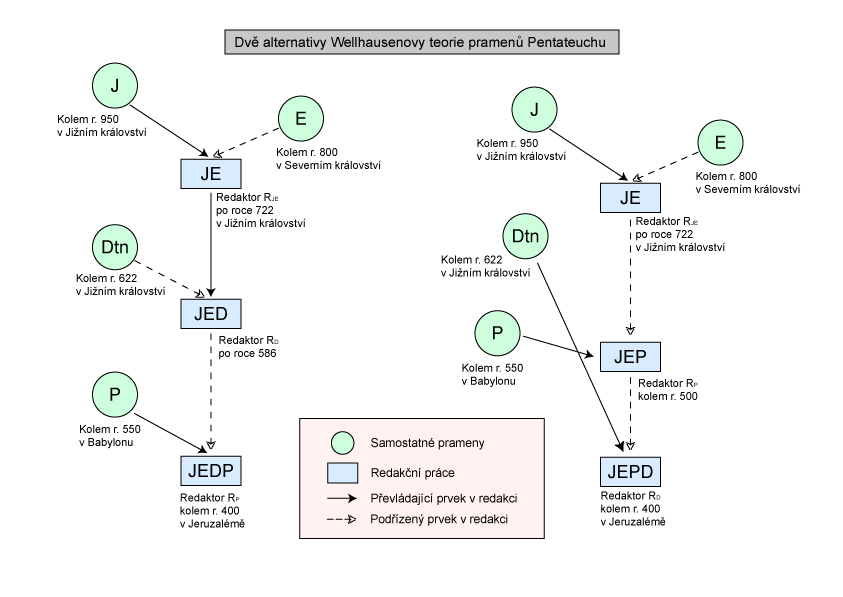 Schéma Wellhausenovy teorie pramenů Pentateuchu Vysvětlivky Dle Welhausenovy teorie: Jahvista (používající pro Boha označení YHWH (יהוה)) působil v 10./9. století v jižním, Judském království a napsal první, nejstarší dějiny. Označuje se písmenem J. Elohista (kdysi E2; pro Boha používá označení Elohím (אלהים)) žil v 8. stol. v severním, Izraelském království a napsal na Jahvistovi nezávislé dějiny. Označuje se písmenem E. Deuteronomista, autor Deuteronomia, je svázán s Jóšiášovou reformou v roce 622 př. Kr. Označuje se písmenem D. Autor tzv. kněžského kodexu, označovaný písmenem P (z německého Priestercodex), působil po exilu a jeho dílo je silně poznačeno poexilním legalismem. Působil někdy na přelomu 6. a 5. stol. př. Kr